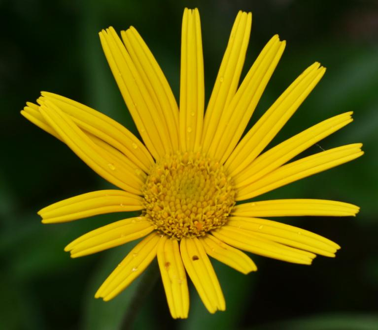 Buphthalmum salicifolium